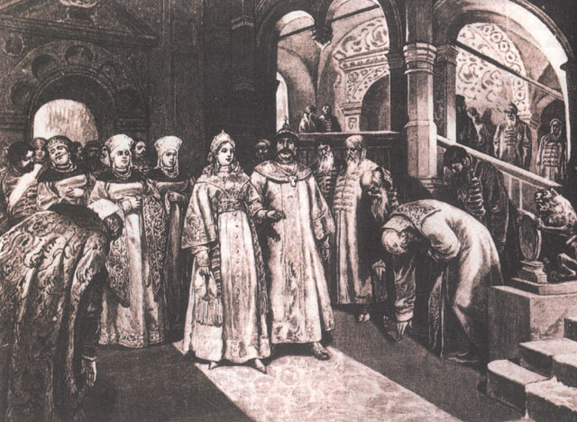 Basilio III presenta a su esposa Elena Glinskaja a la corte, pintado por Klavdij Lebedev